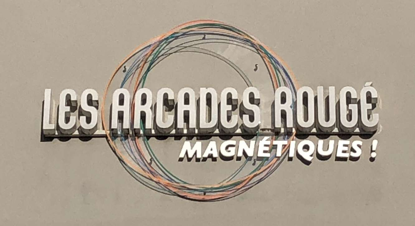 Logo Arcades